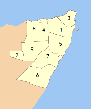 プントランドの位置地図 Bari（バリ州） Cayn（English:Ayn、アイン州） Gardafuul（ガーダフル州） Haylaan（ハイラーン州） Karkaar（カルカール州） Mudug（ムドゥグ州） Nugal（ヌガール州） Sanaag（サナーグ州） Sool（スール州）